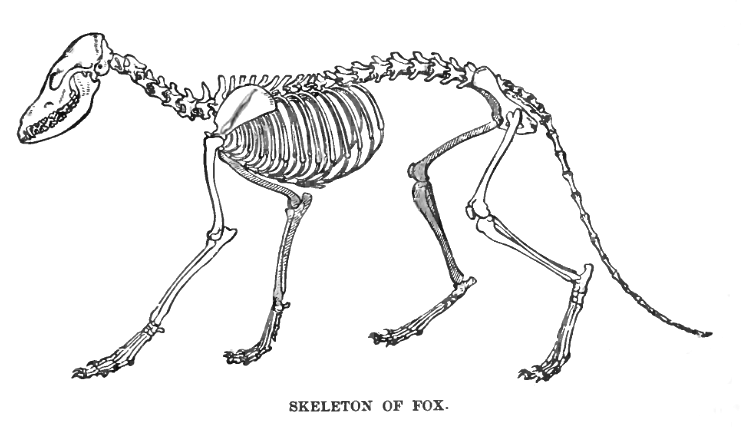 Fox skeleton